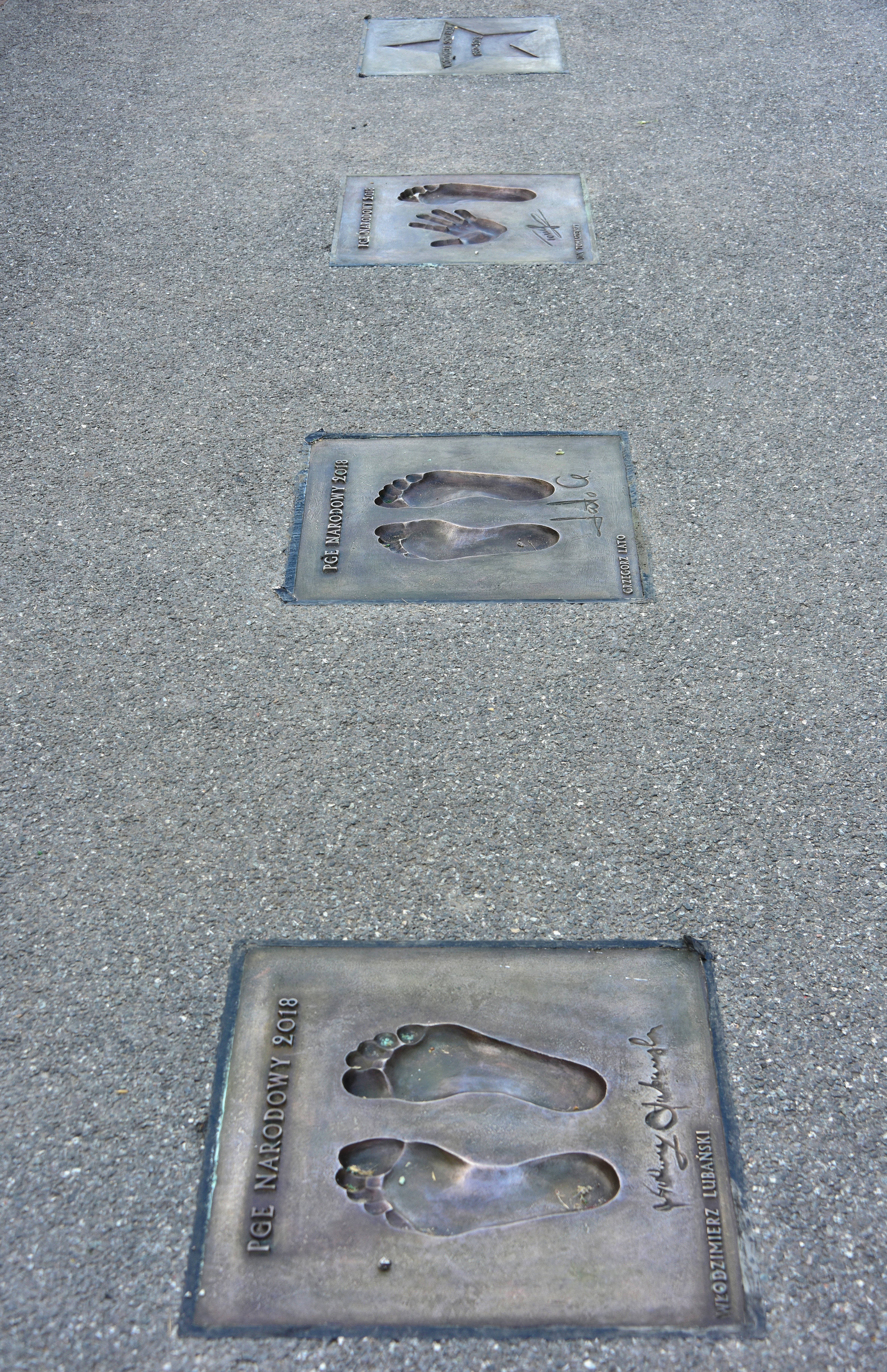 Aleja Gwiazd Piłki Nożnej na promenadzie Stadionu Narodowego w Warszawie